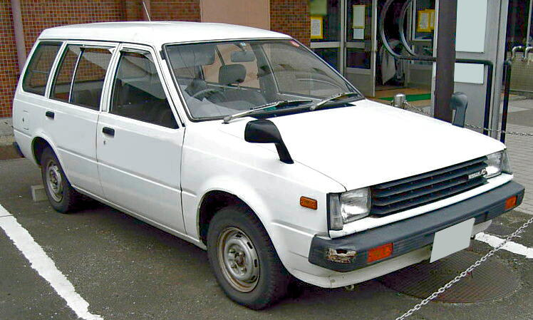 日産・ADバン（初代・後期型）